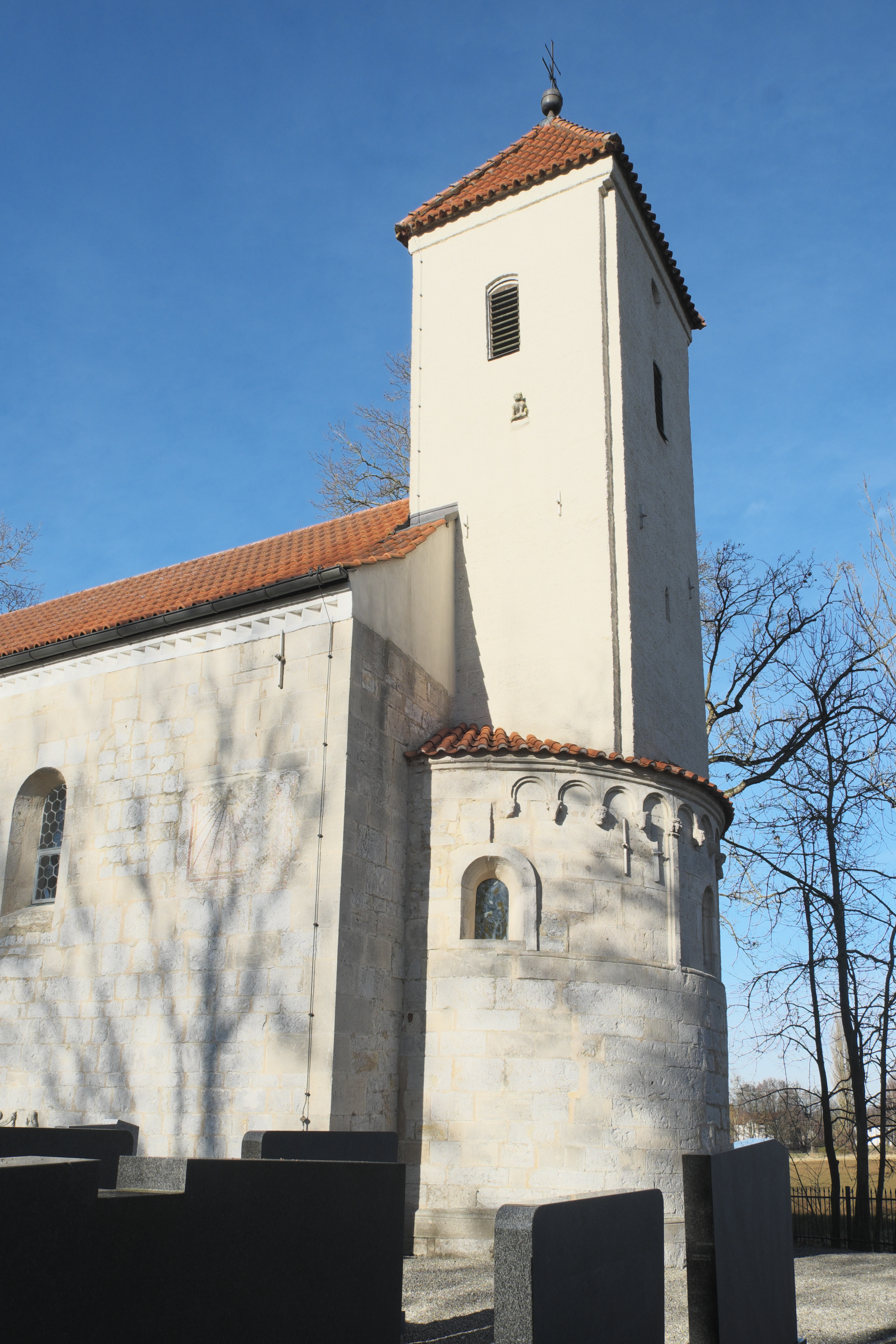 Katholische Pfarrkirche St. Ulrich in Ainau (Geisenfeld) im Landkreis Pfaffenhofen an der Ilm (Bayern/Deutschland), Turm und Apsis